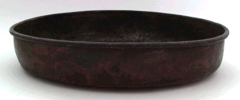 Melkeringe i kobber. Antakelig fra slutten av 1800-årene og innkommet fra Røros. Foto Norsk Folkemuseum, NF.1918-0834.